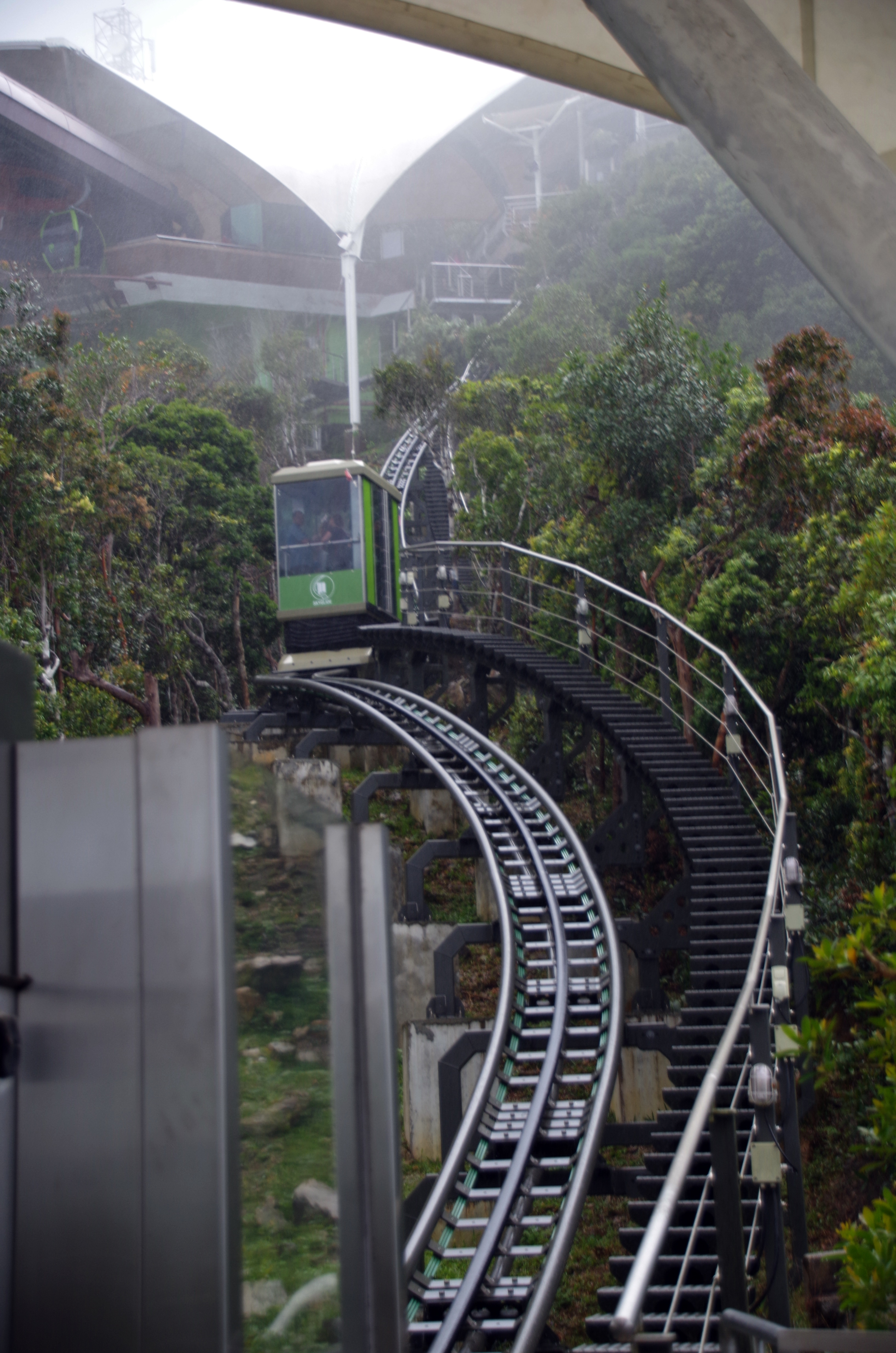 Langkawi Sky Bridge Sky Glide